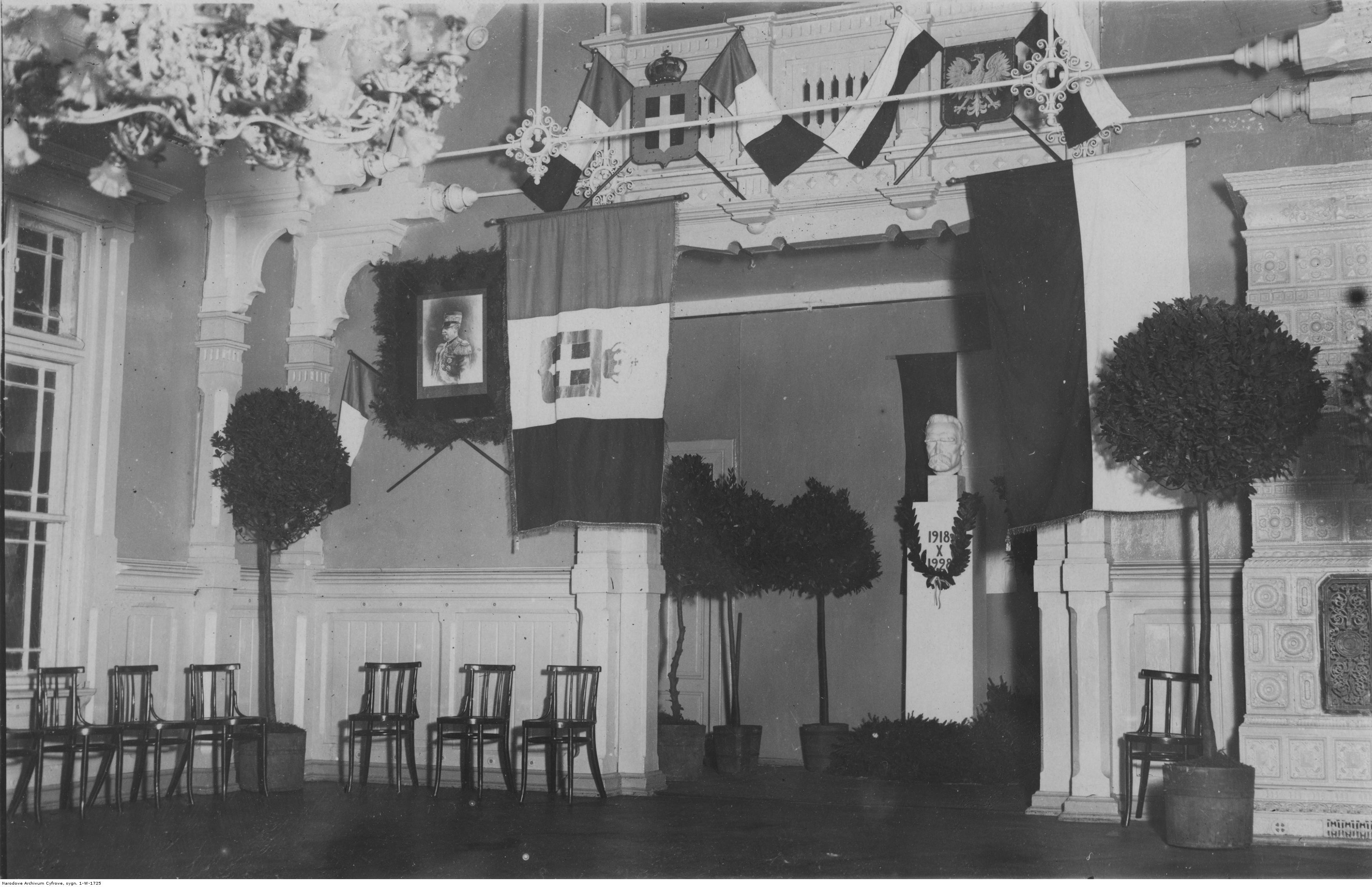 Kasyno oficerskie 8 Batalionu Saperów w Toruniu. Jedna z sal kasyna w dniu uroczystości włoskich; 17 listopada 1928. Widoczne udekorowane popiersie marszałka Józefa Piłsudskiego (w głębi, w środku), wiszące flagi polskie i włoskie m.in. flaga Królestwa Włoch służąca jako bandera Regia Marina (z lewej) oraz godło Polski. Koncern Ilustrowany Kurier Codzienny - Archiwum Ilustracji. Sygnatura: 1-W-1725